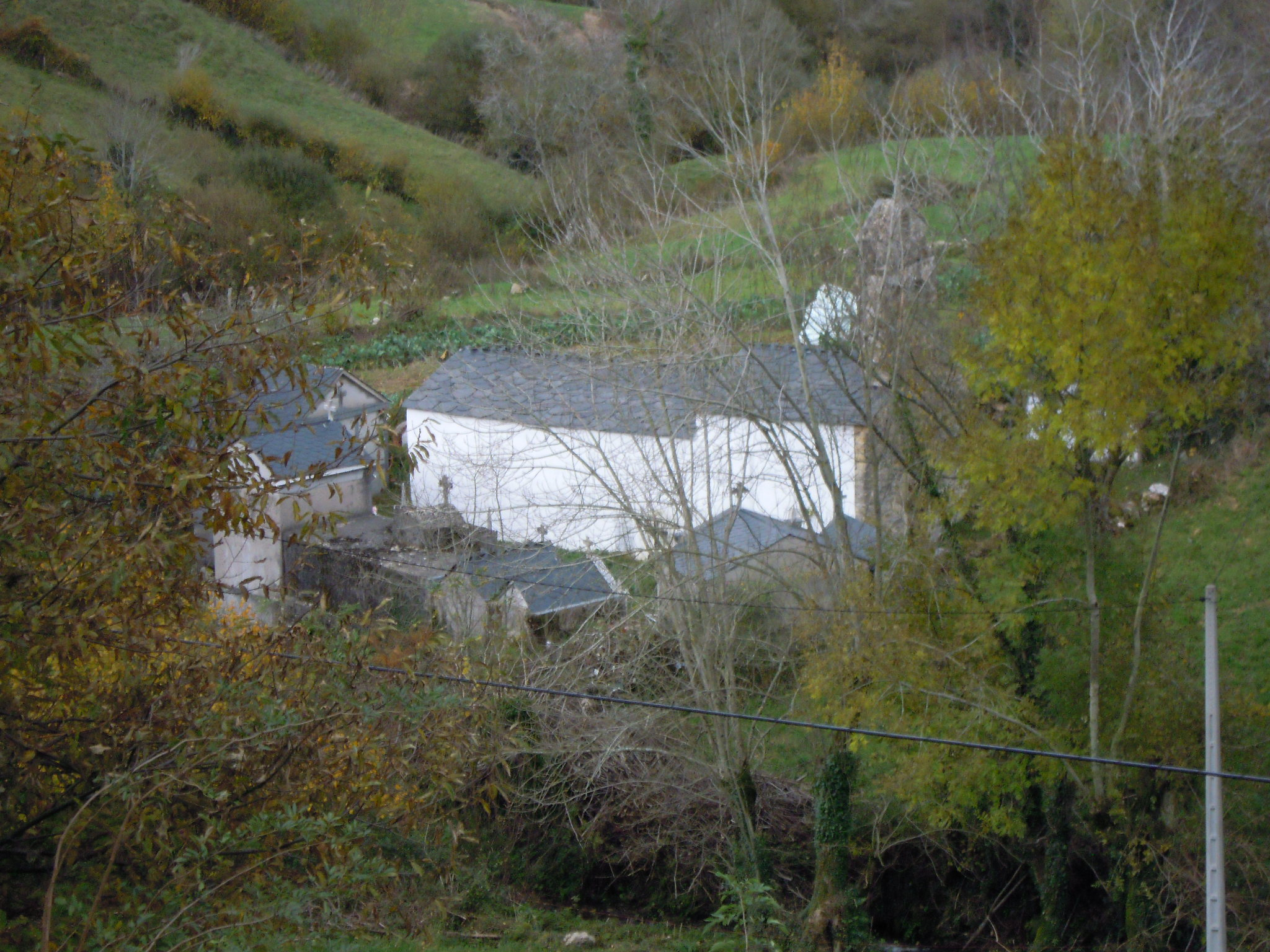 Igrexa parroquial da Alence (As Nogais).